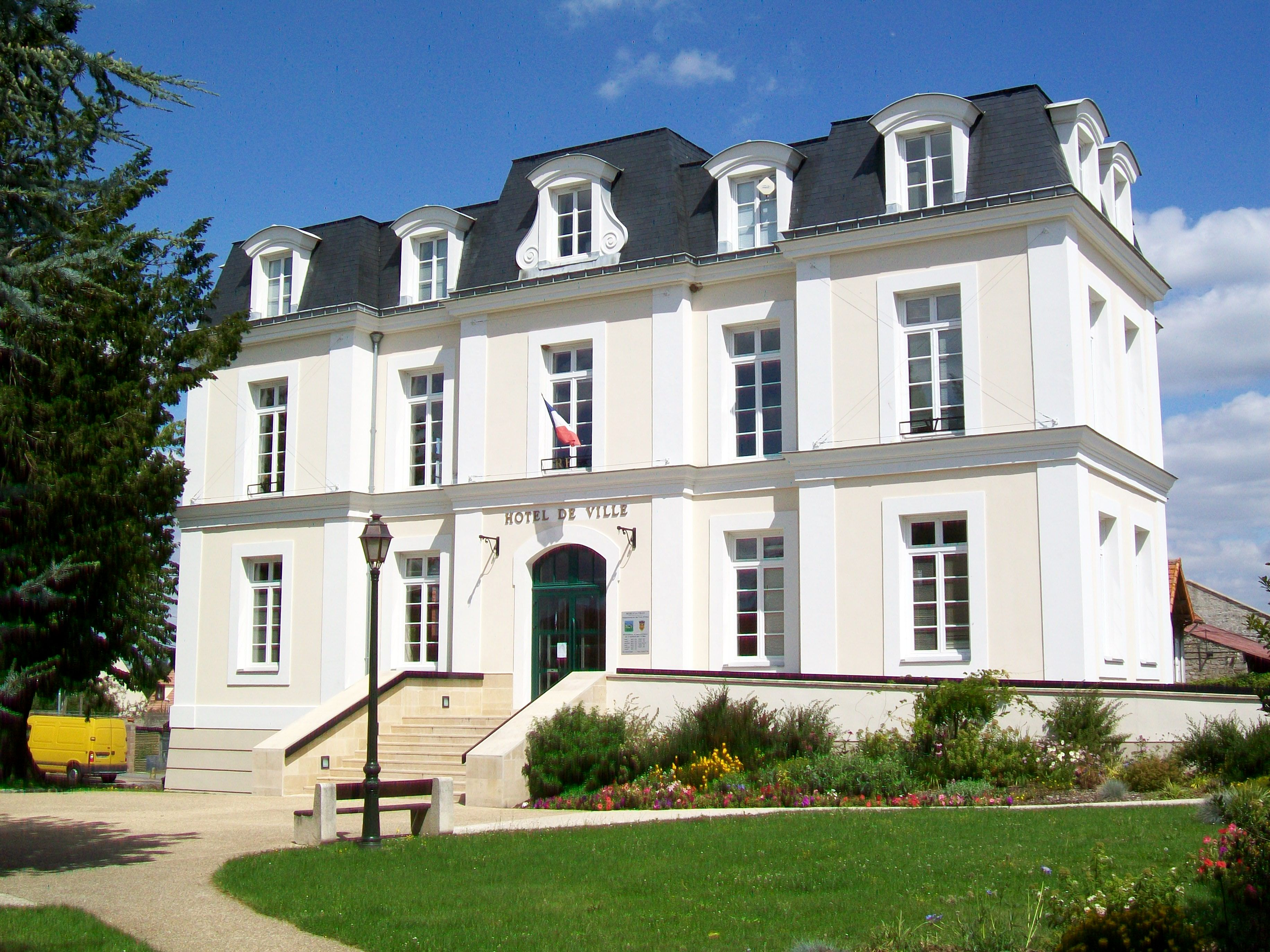 La mairie de Marly-la-Ville.